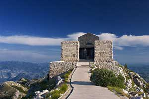 ловчин